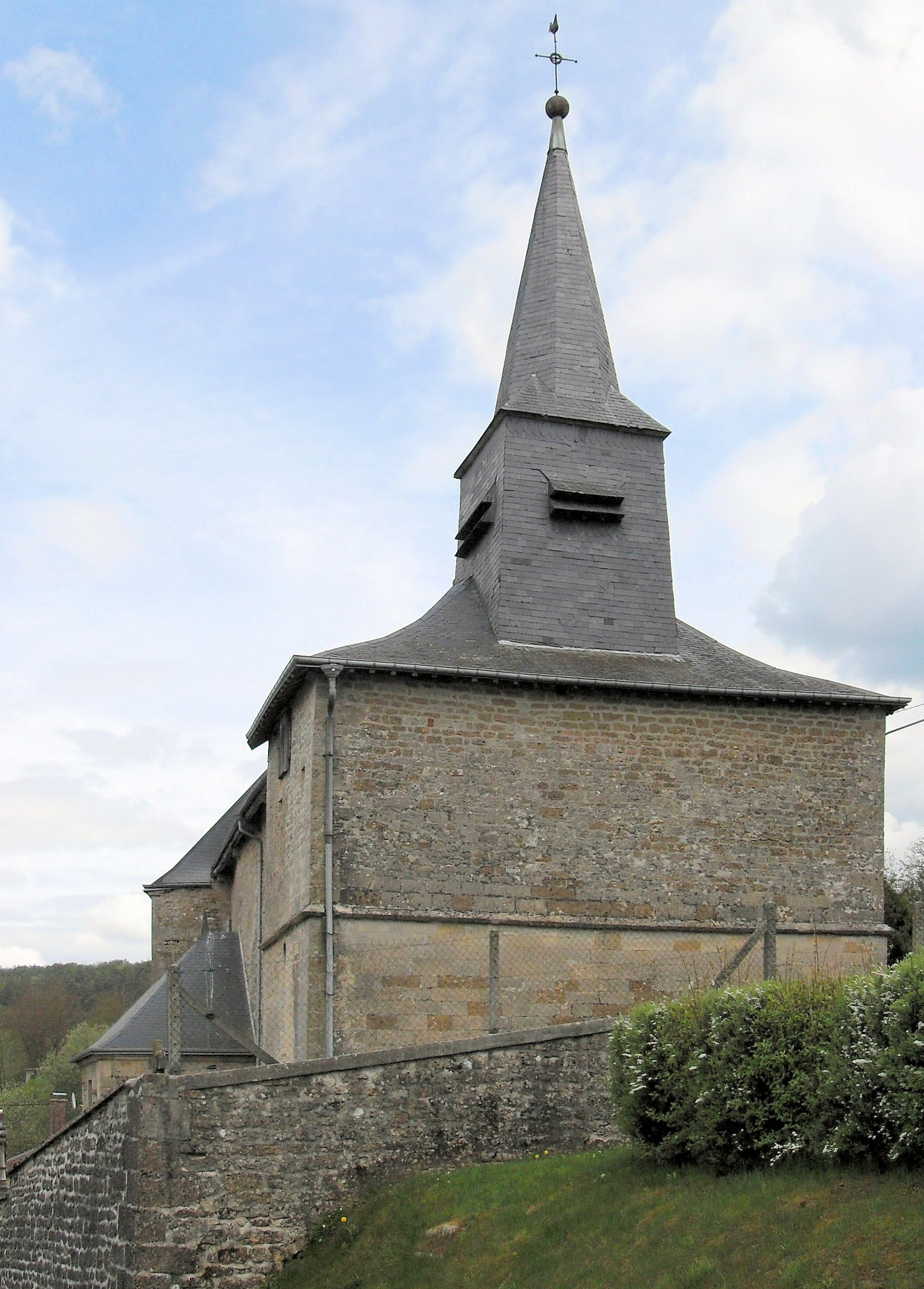 L'église Saint-Rémi à Yoncq